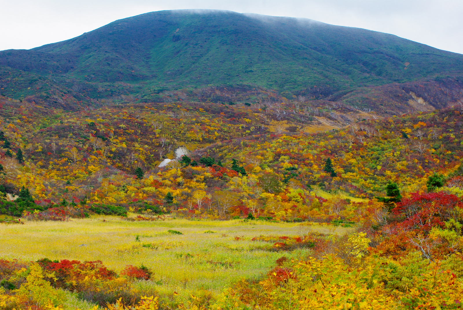 名残ヶ原からの須川岳（栗駒山） Peak Sukawa(Mt. Kurikoma) from Nagoriga-hara marsh